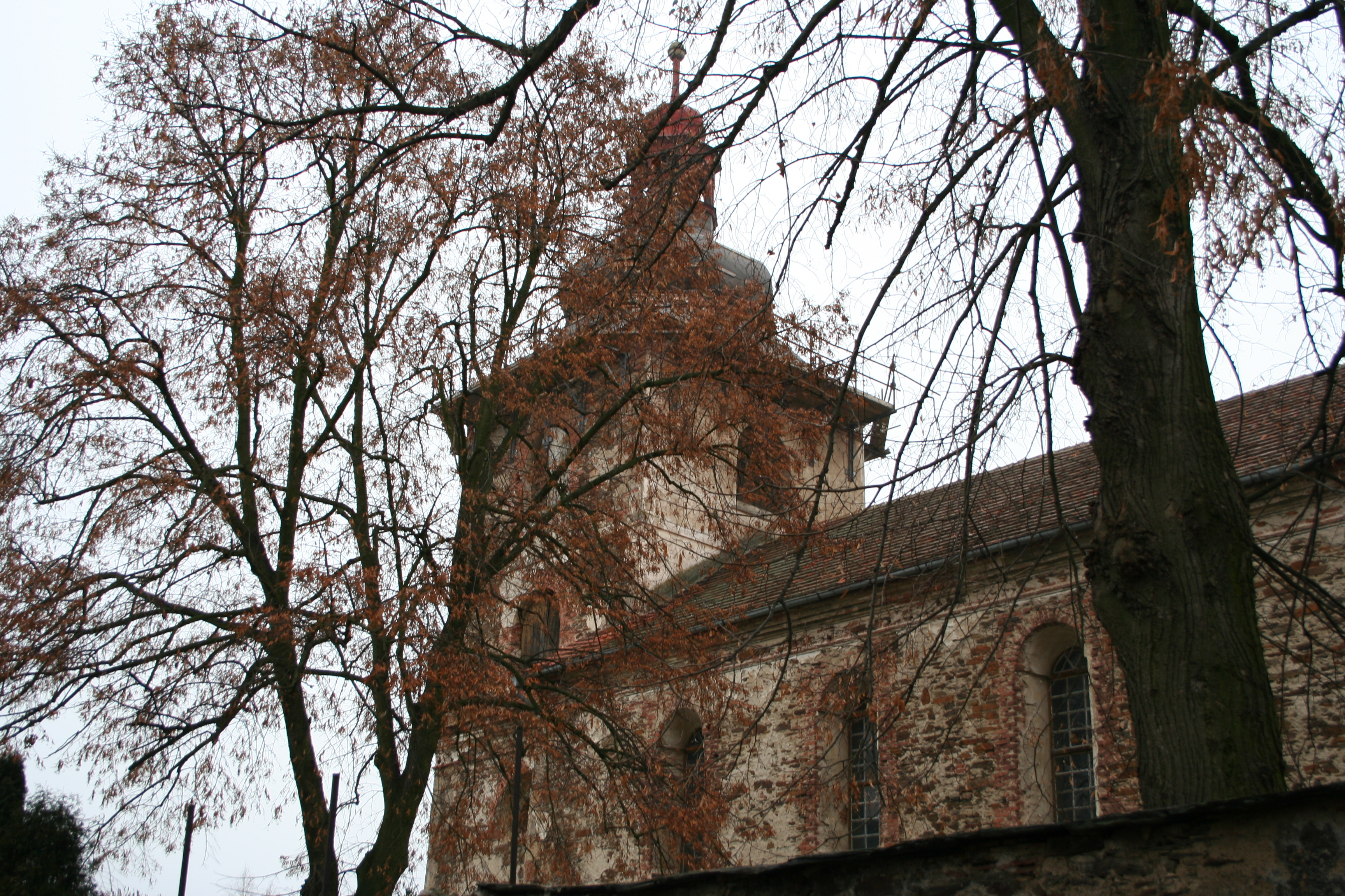 Kostel Povýšení svatého Kříže (Kobylé)